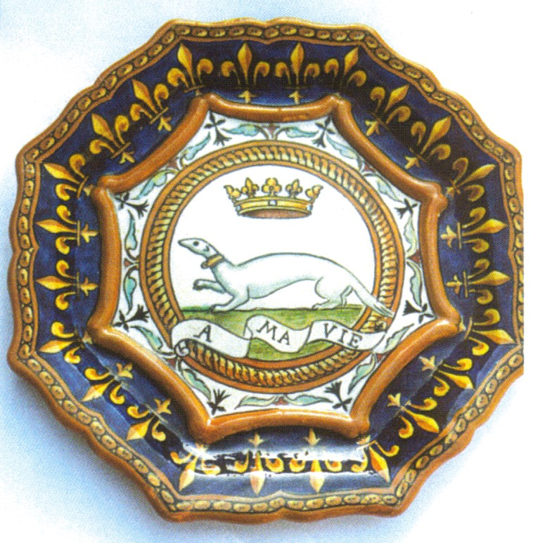 Assiette Adrien Thibault